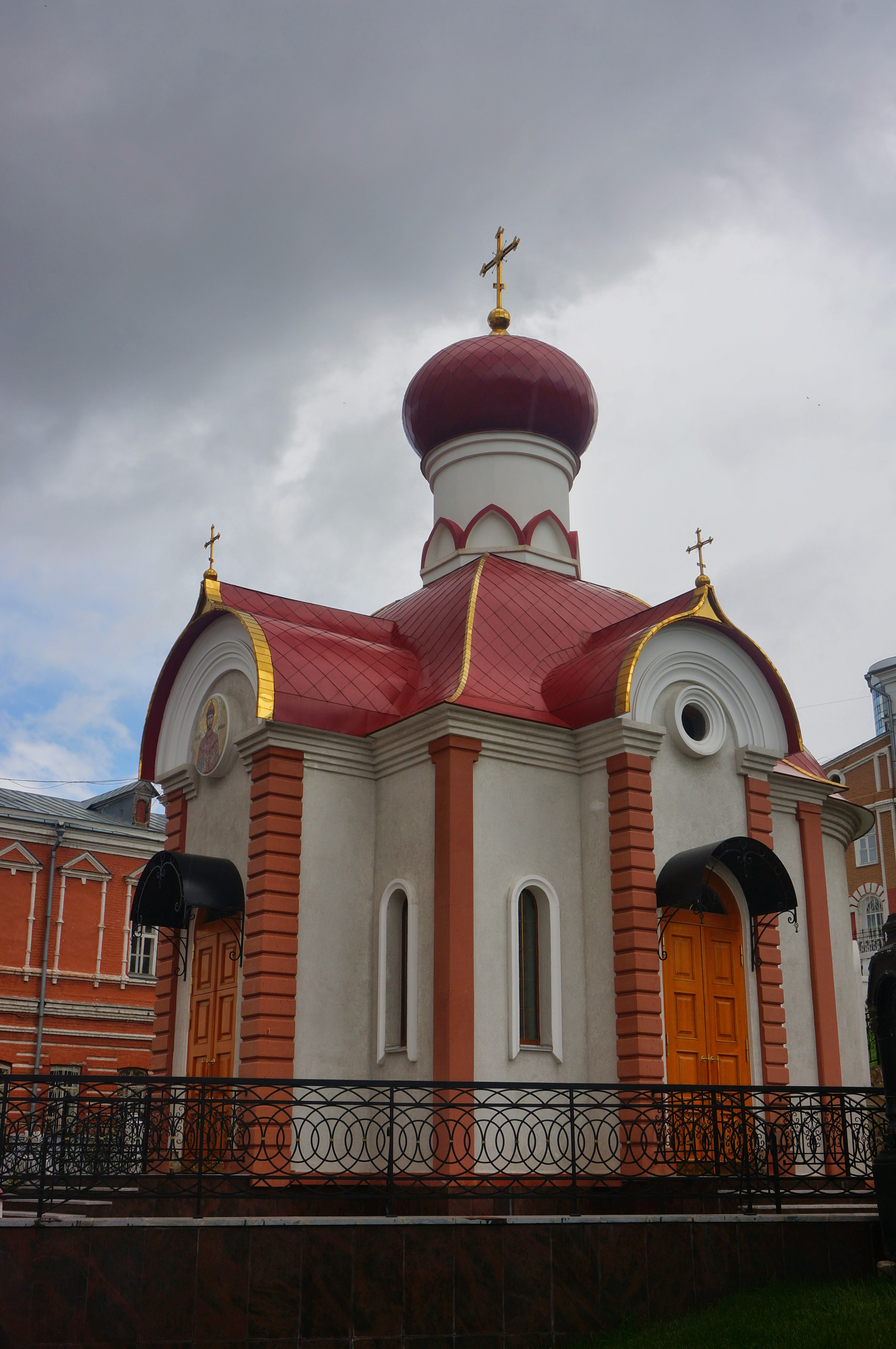 Иверский женский монастырь, Самара, Россия